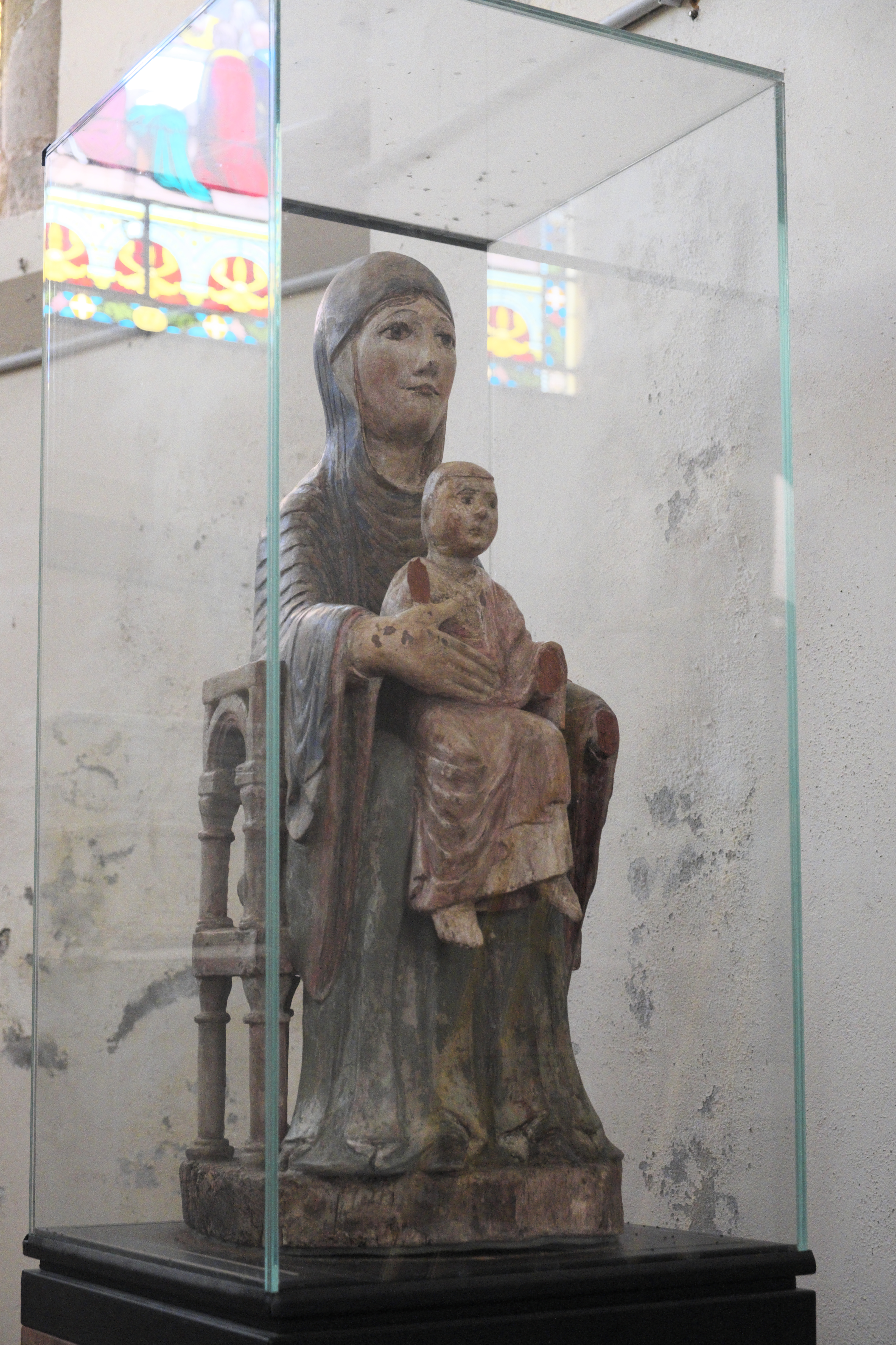 Katholische Pfarrkirche Sainte-Croix, auch Sainte-Agathe, in Ris im Département Puy-de-Dôme (Auvergne-Rhône-Alpes), romanische Madonna mit Kind